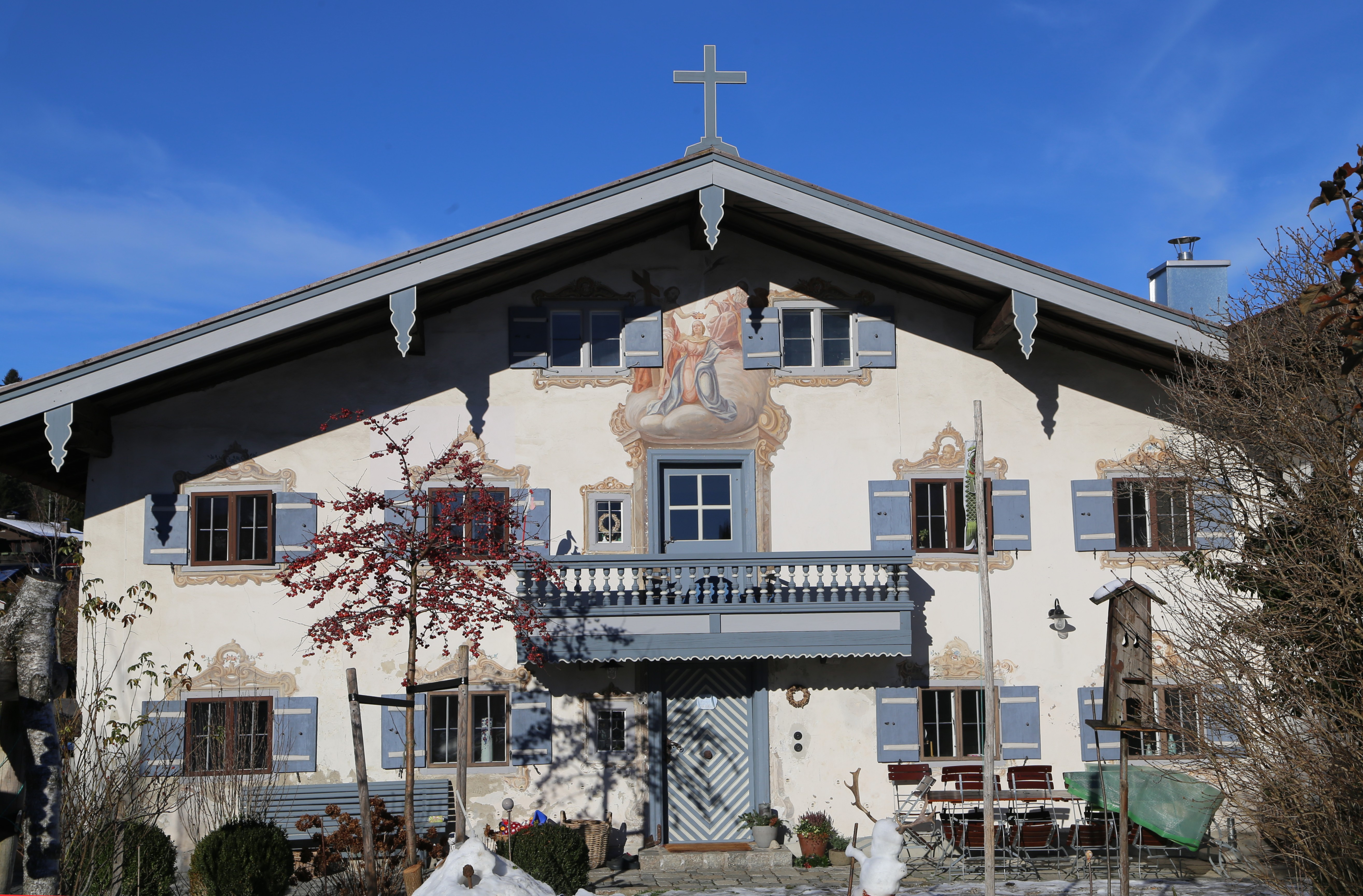 Am Gries 10, Prien am Chiemsee; Wohnhaus, zweigeschossiger Flachsatteldachbau mit Laube und erneuerter Bemalung, um 1738–40, 1804 Erneuerung des rückwärtigen Dachstuhls